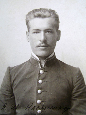 Андрій Касьяненко